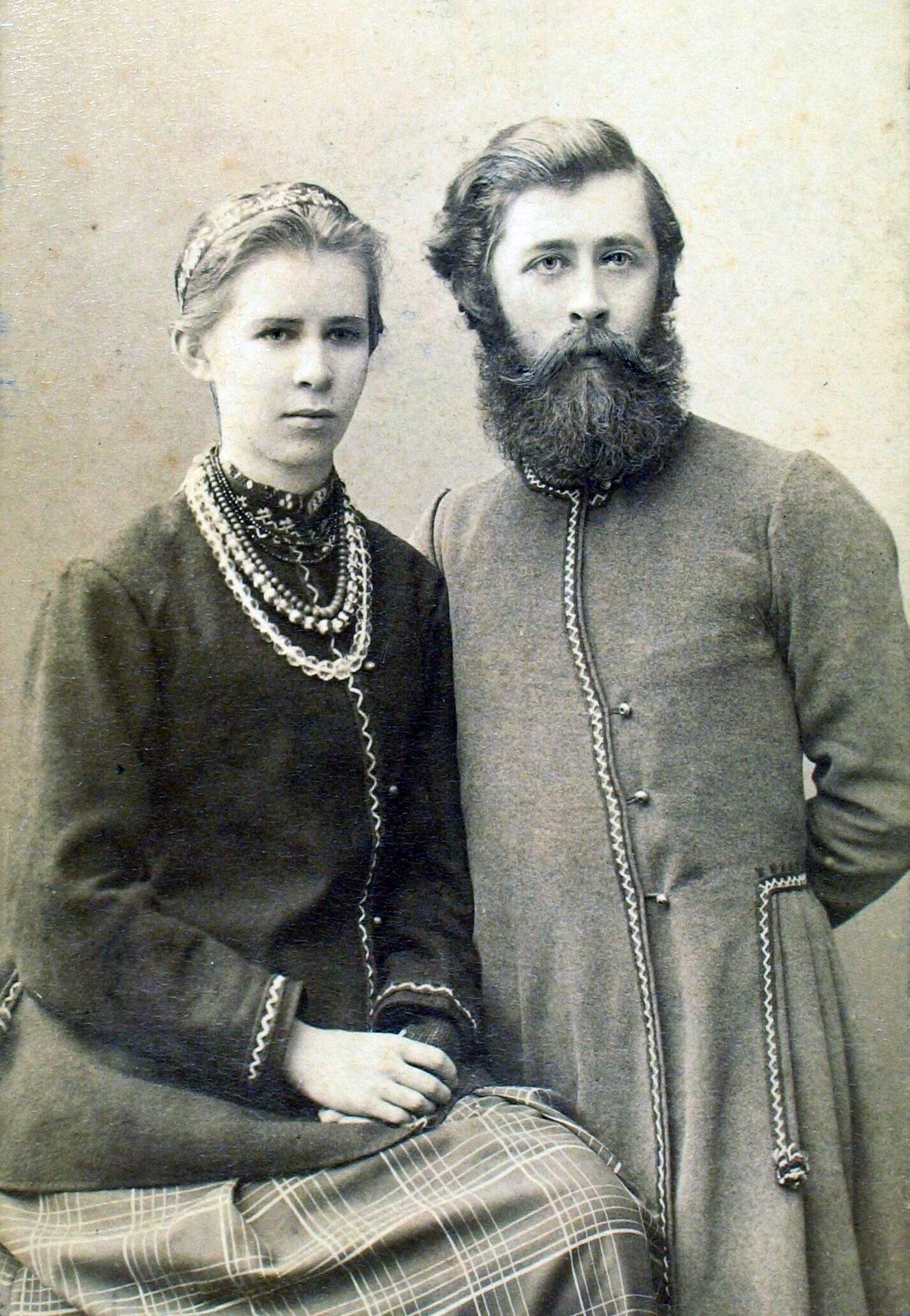 Лариса і Михайло Косачі. 1890 р. Леся Українка з братом